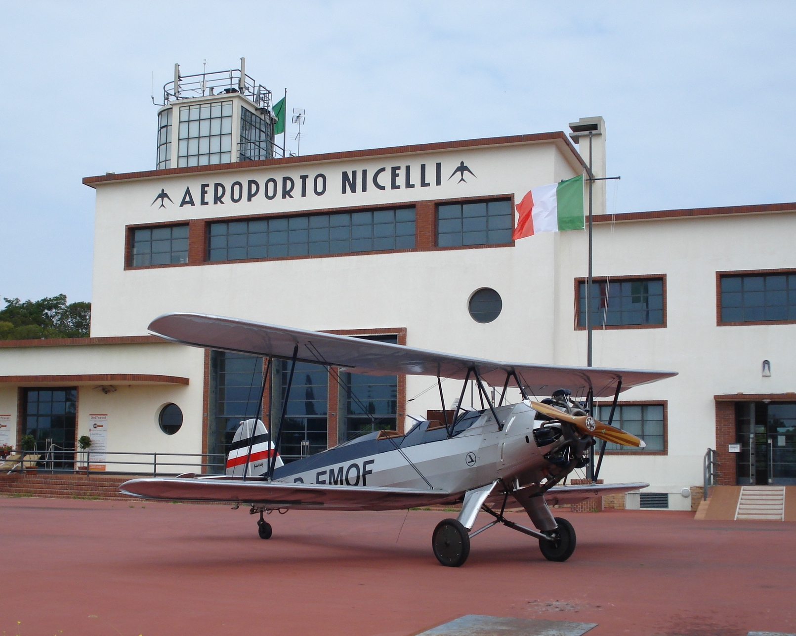 Focke-Wulf Fw44 "Stieglitz" auf Aeroporto Nicelli